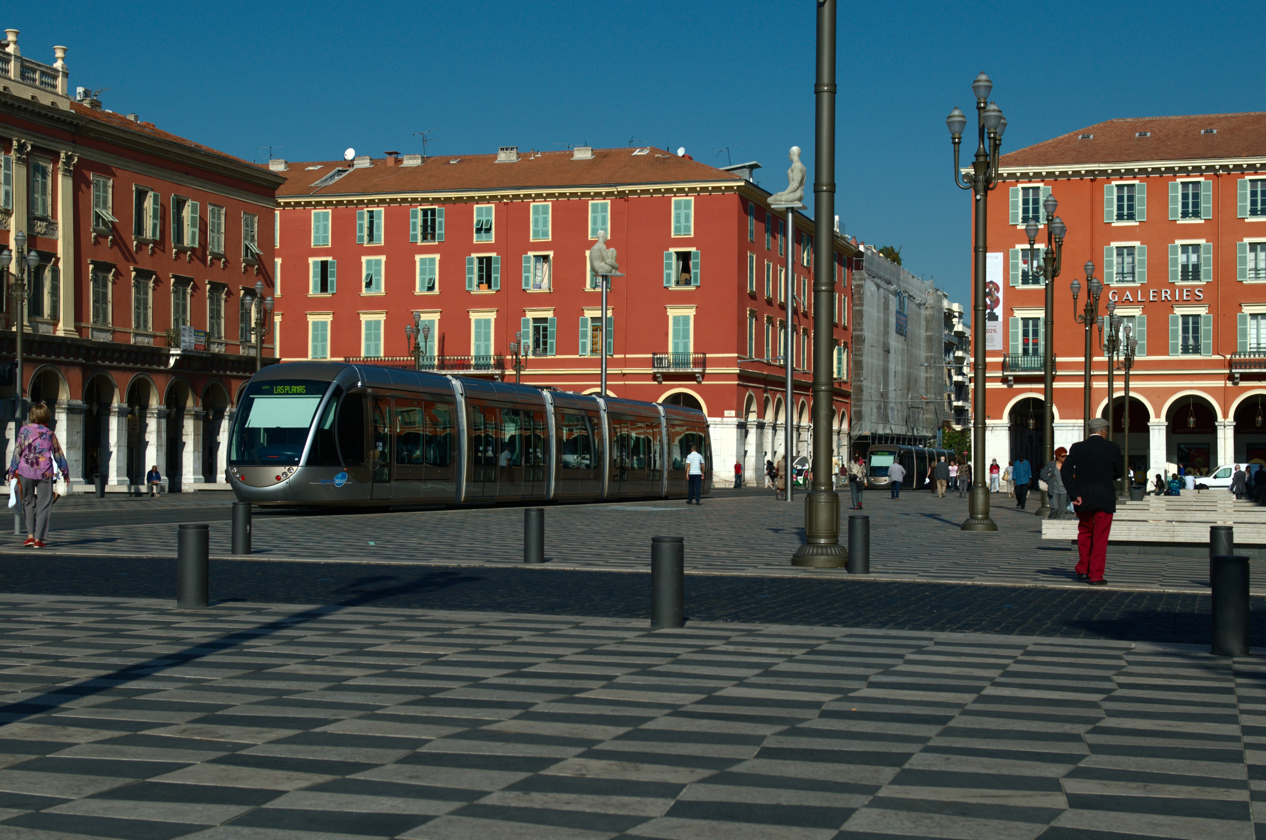 Tramway de Nice sur la place Masséna le 10 octobre 2008